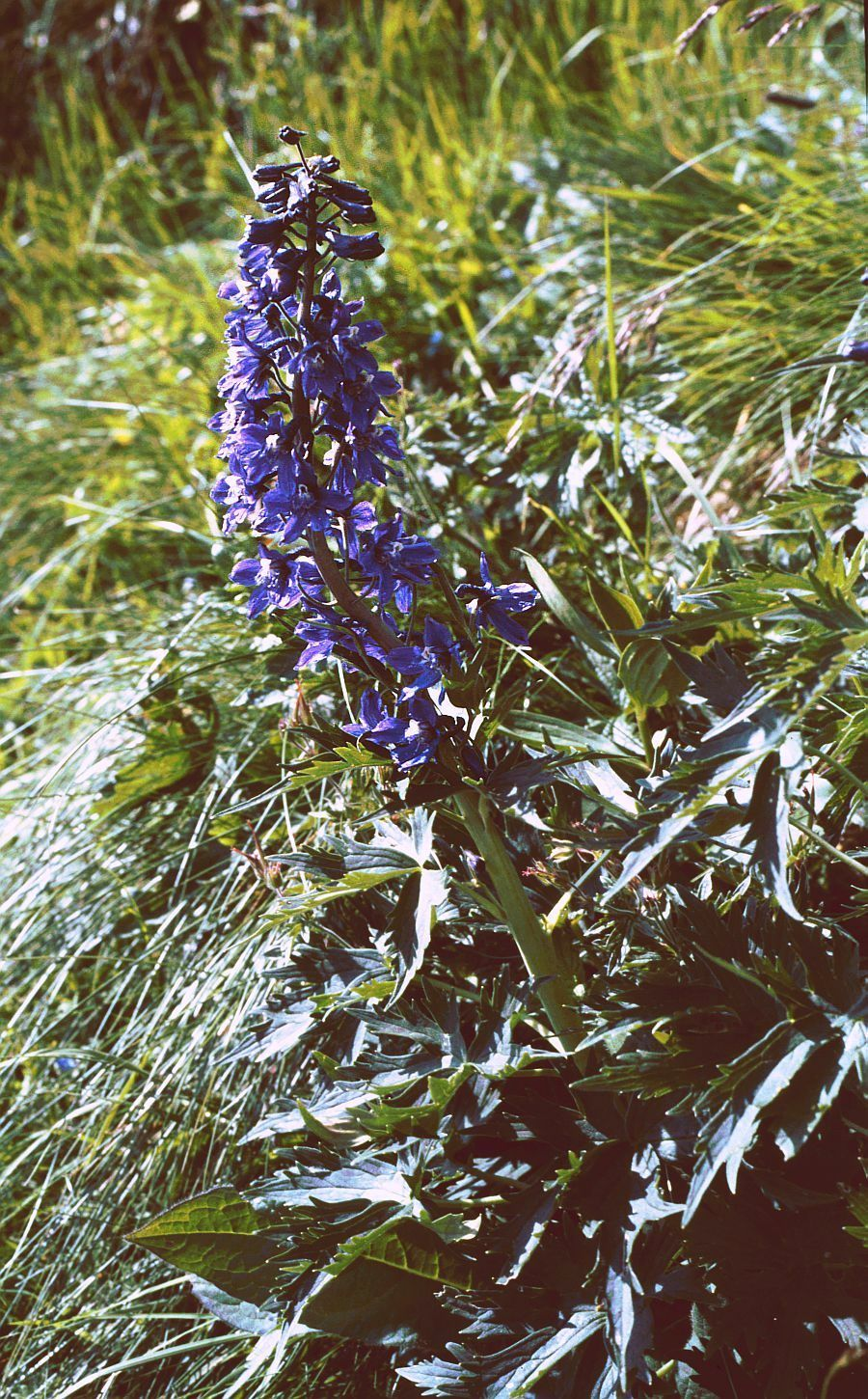 Hoher Rittersporn (Delphinium elatum subsp. austriacum), Hahnenfußgewächse (Ranunculaceae) - Österreich/Austria/Autriche: Kärnten/Carinthia, Nockberge, Gregerlenock